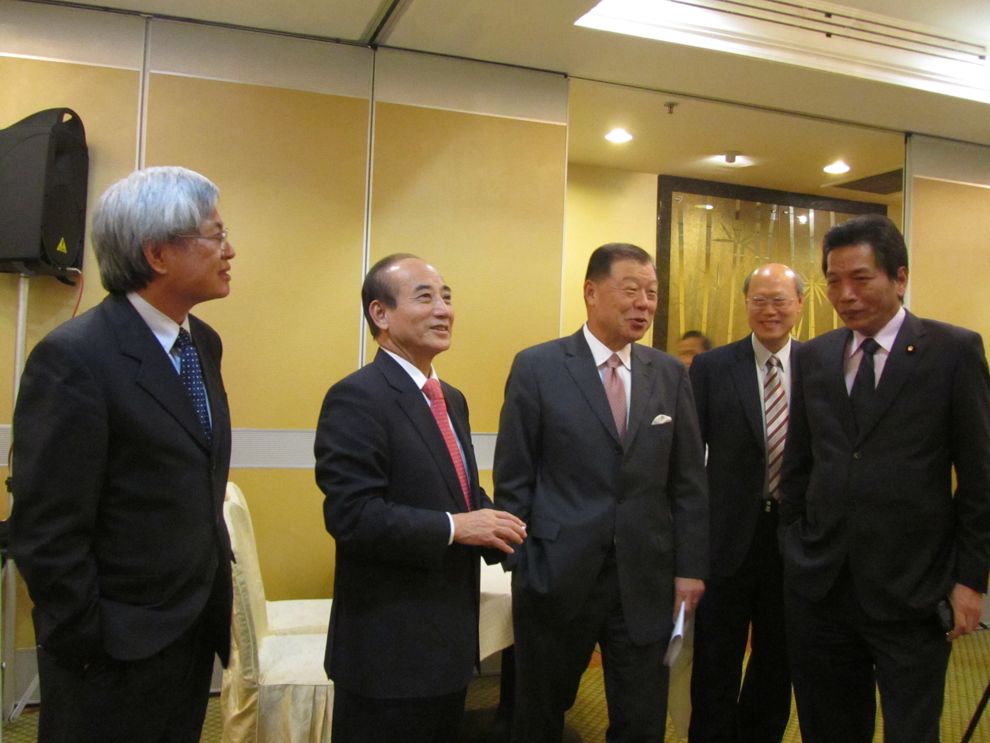 中文（台灣）: 台灣立法院長王金平（左二）率立委李鴻鈞（右一）和邱文彥（左一）訪洛